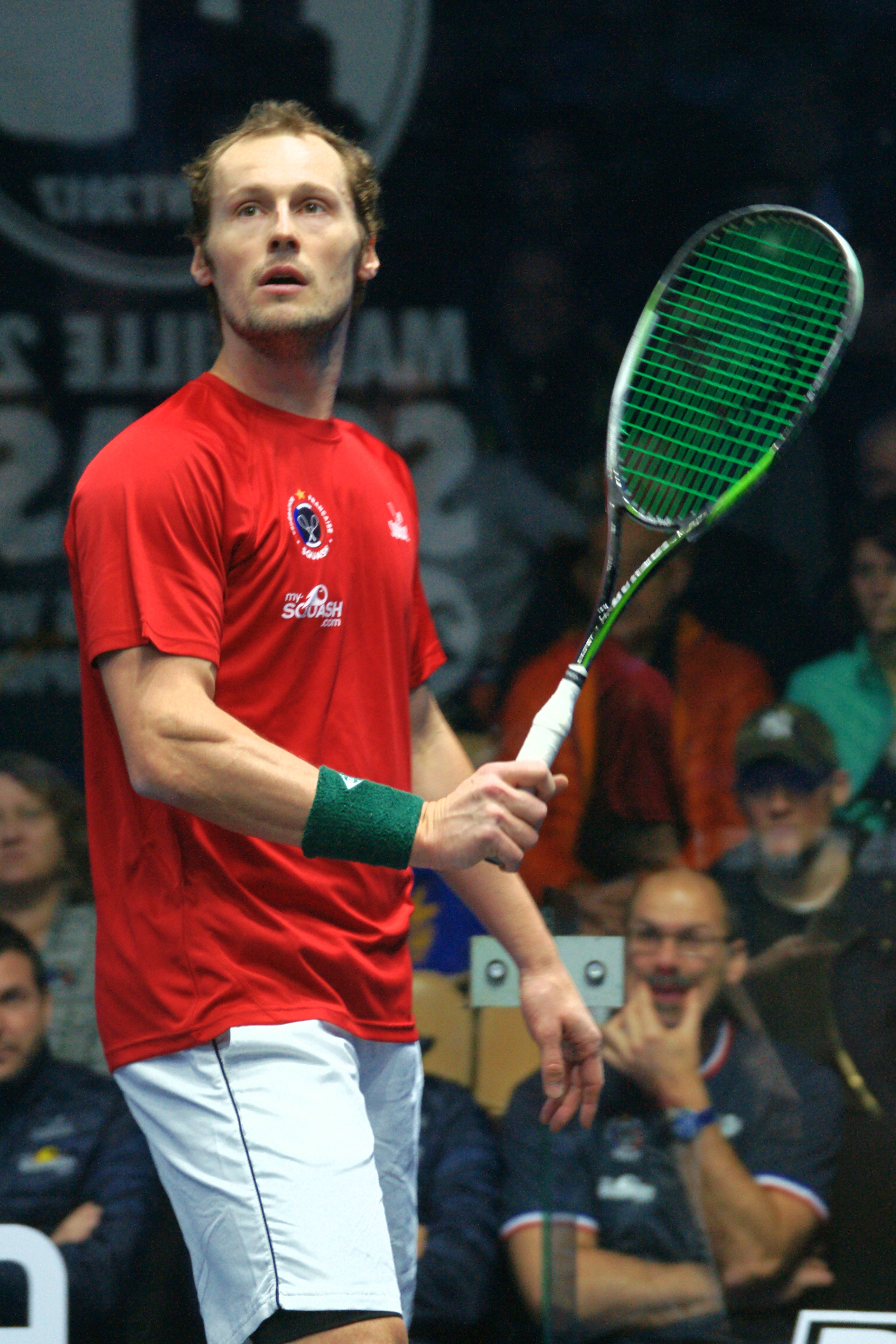 championnats du monde de squash par équipe Marseille 2017